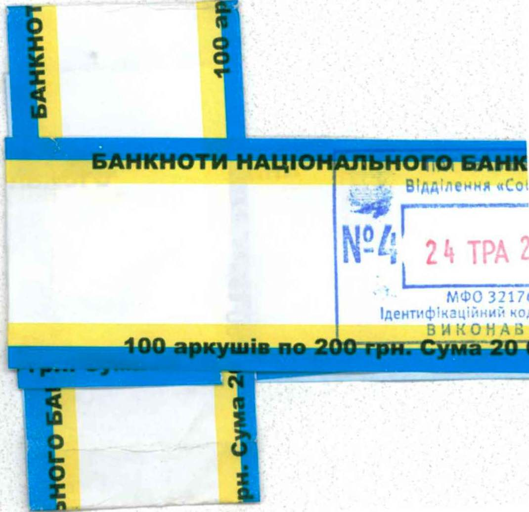 Упаковка (банковской бандероли) НБУ 20 000 гривен (100 шт. по 200), отделение "Соборное" 24 мая 2012